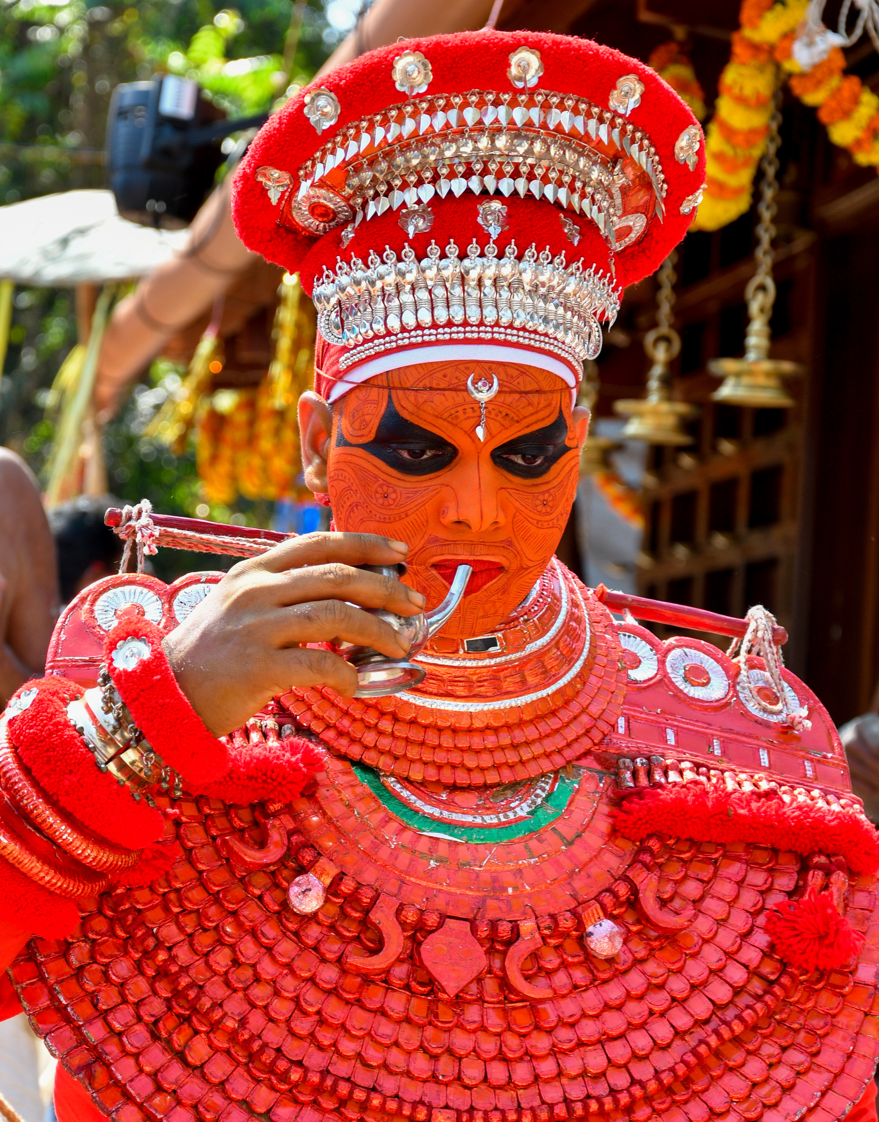 Porkkali theyyam at Muzhappilangad Porkkali kaavu